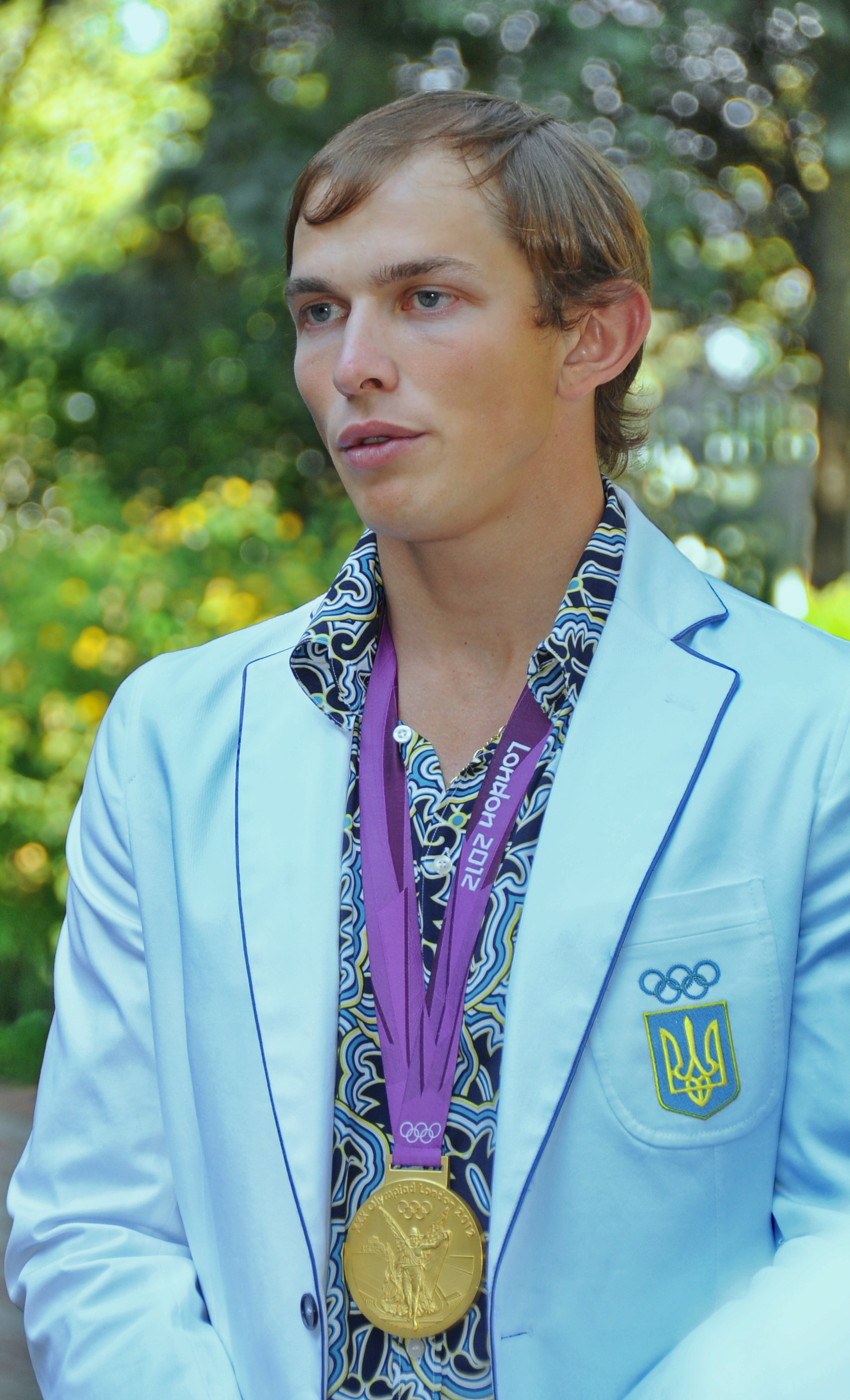 Олимпийский чемпион Юрий Чебан